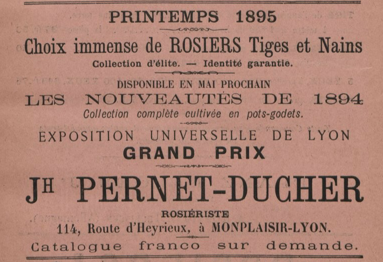 Publicité pour les établissements Joseph Pernet-Ducher dans le Journal des roses, décembre 1896.